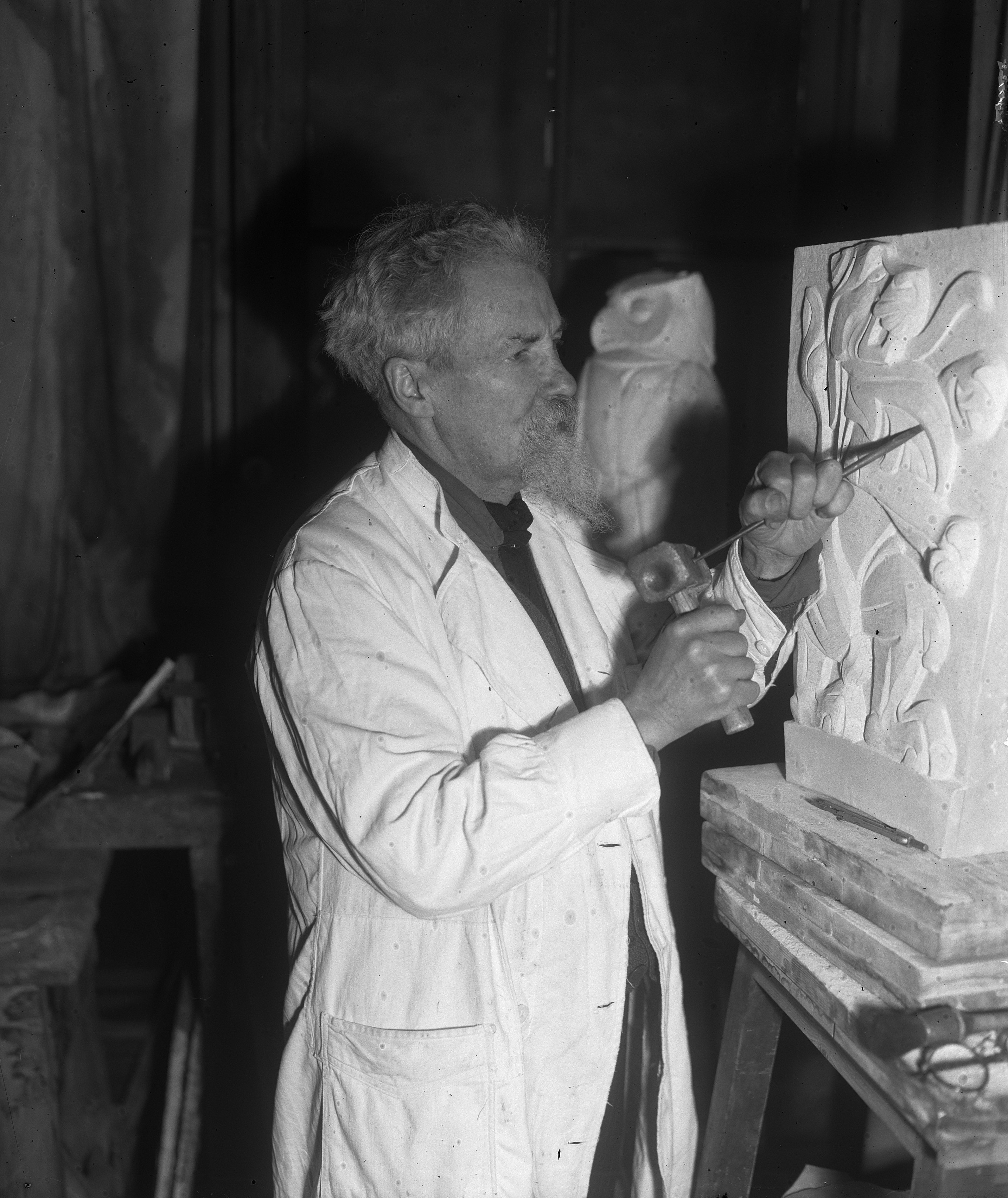 Collectie / Archief : Fotocollectie Anefo Reportage / Serie : [ onbekend ] Beschrijving : Beeldhouwer Altorf Den Haag Datum : 23 januari 1951 Locatie : Den Haag, Zuid-Holland Fotograaf : Duinen, […] van / Anefo Auteursrechthebbende : Nationaal Archief Materiaalsoort : Glasnegatief Nummer archiefinventaris : bekijk toegang 2.24.01.09 Bestanddeelnummer : 904-4074